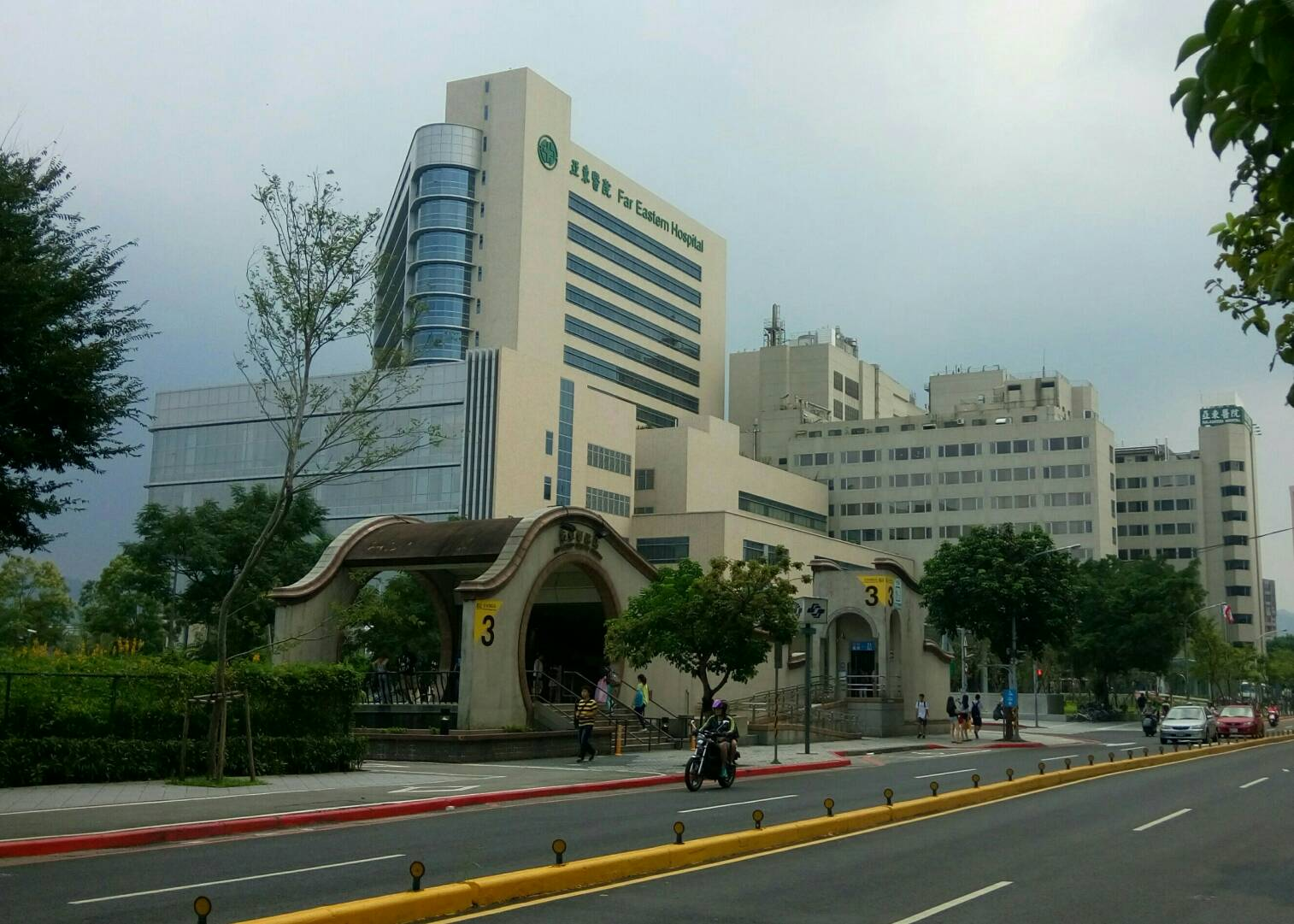 亞東紀念醫院與台北捷運亞東醫院站3號出口。